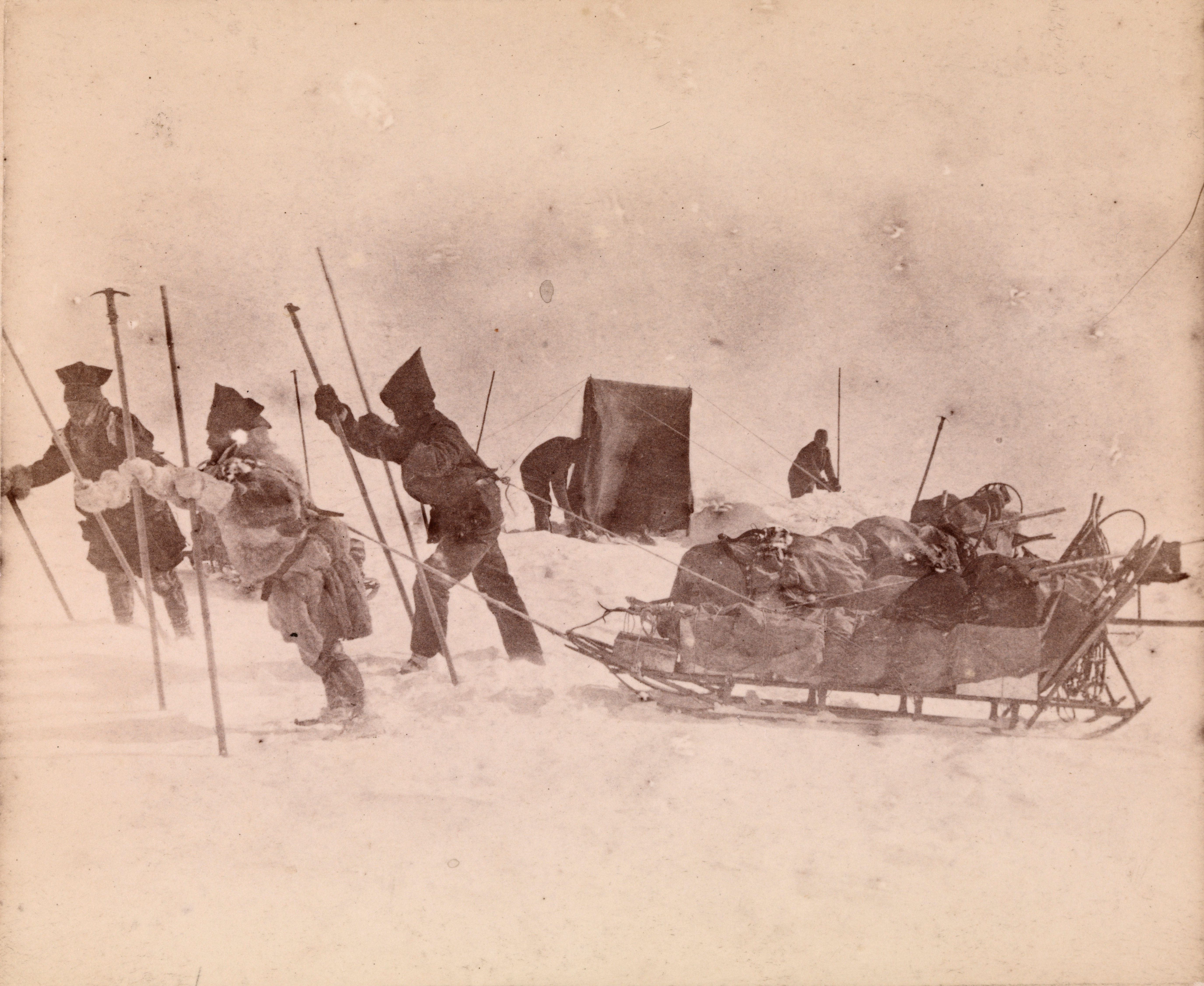 Участники гренландской экспедиции Нансена во время перехода через ледник.